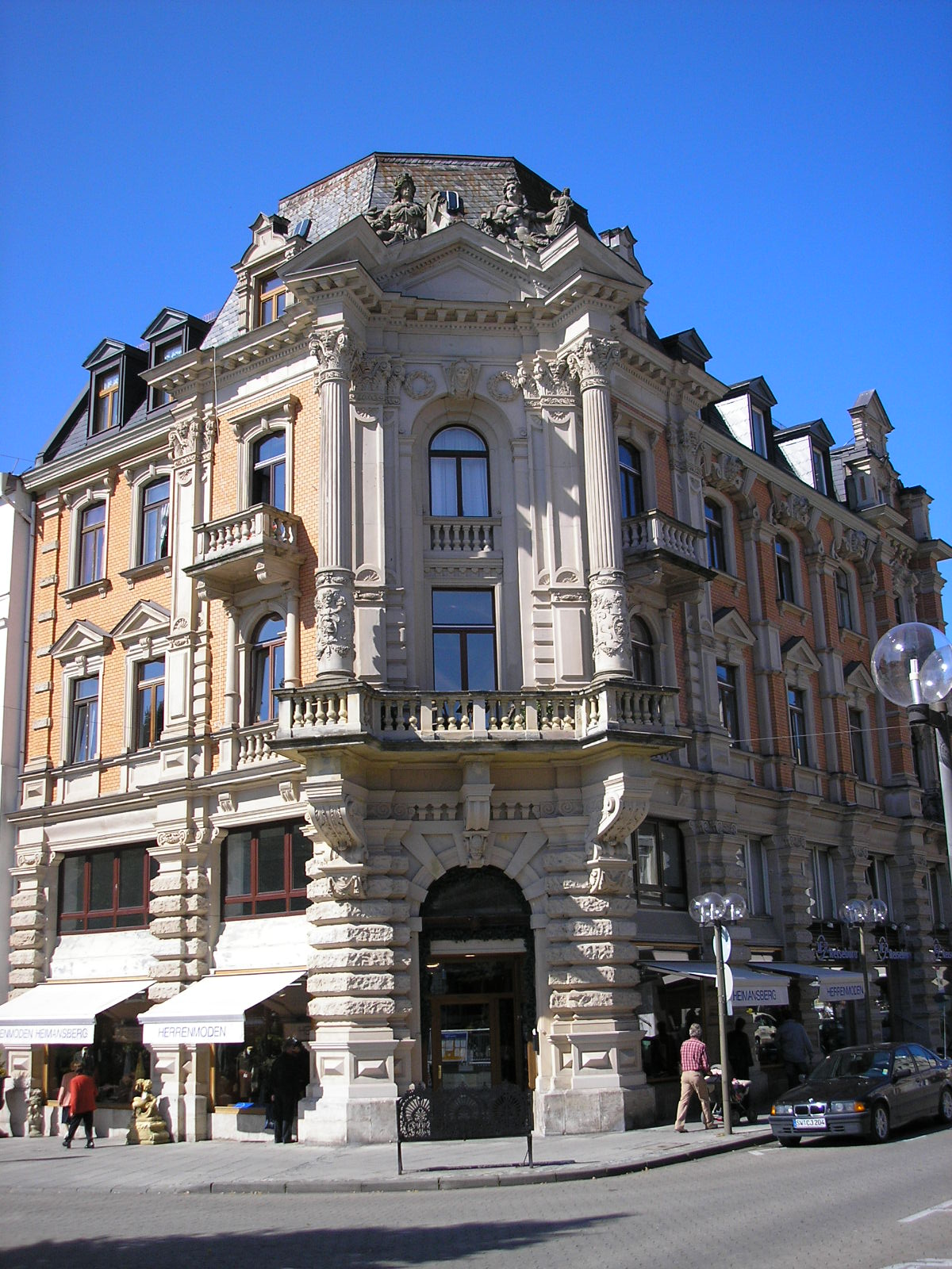 Bad Kissingen (Unterfranken), Am Kurgarten 2.